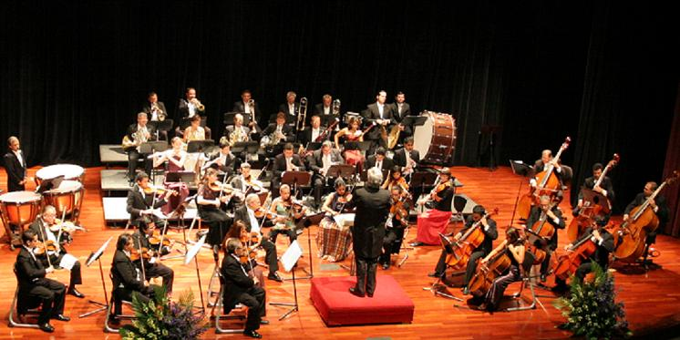 Orquesta Millennium dirigida por Dieter Lehnhoff, año 2007.